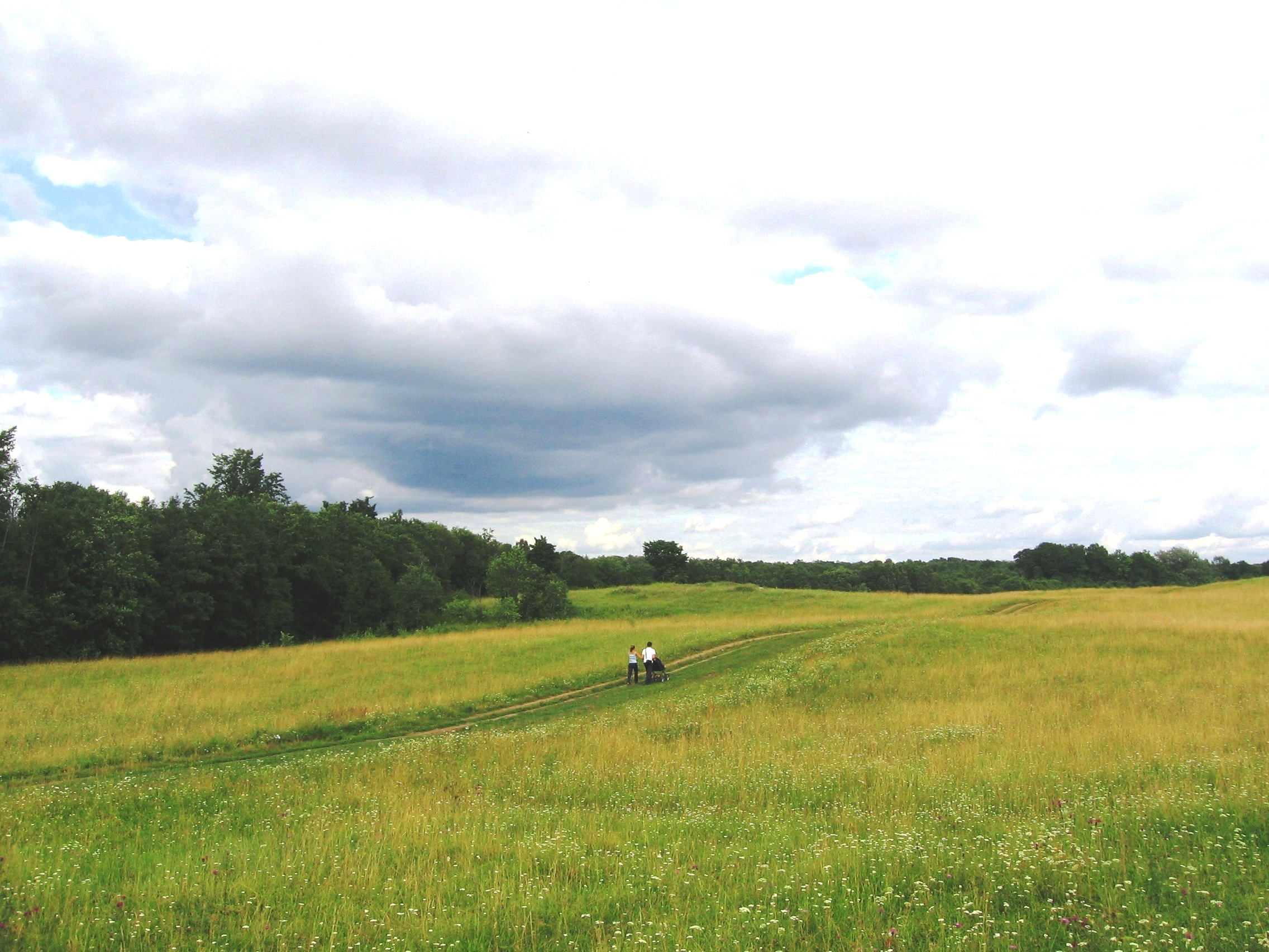 Новгородская обл. Около д. Большая Удрая. Раздолье